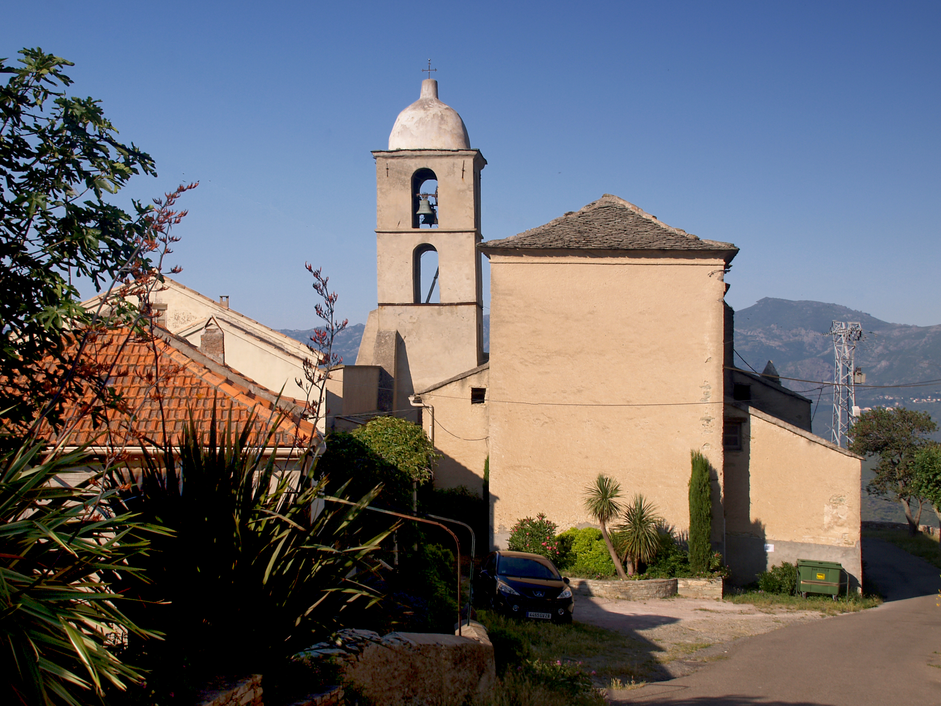 San-Gavino-di-Tenda (Corsica) - Église paroissiale San-Gavino